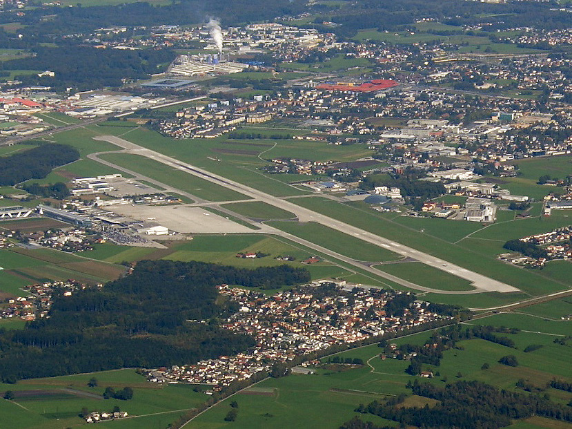 3897_salzburg-airport3897_salzburg-airport